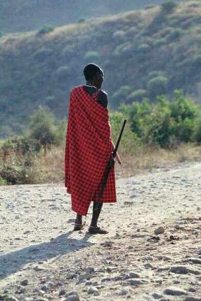 Maasai